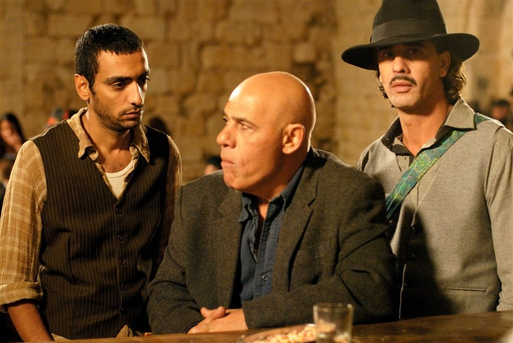 ניר לוי, אורי גבריאל ודודו טסה, בסרט בלדה לאביב הבוכה